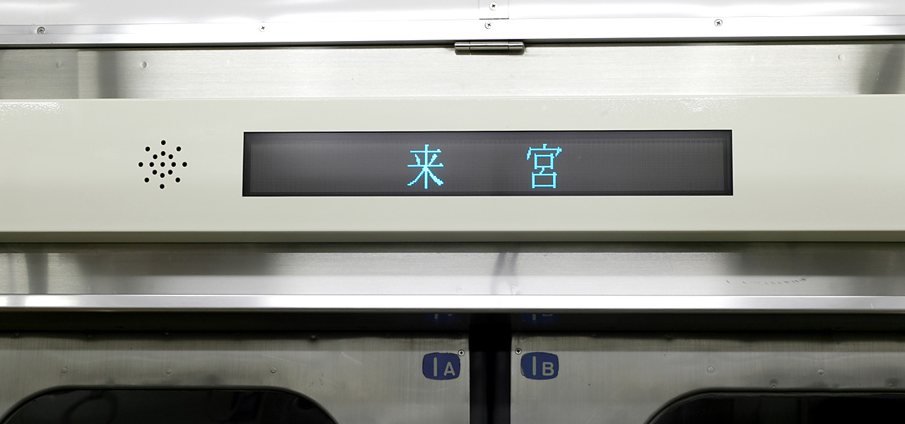 Izukyu 8000 series EMU, Moha 8204